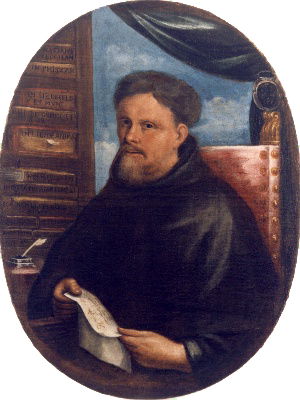 fra Bartolomeo Mastri, ritratto